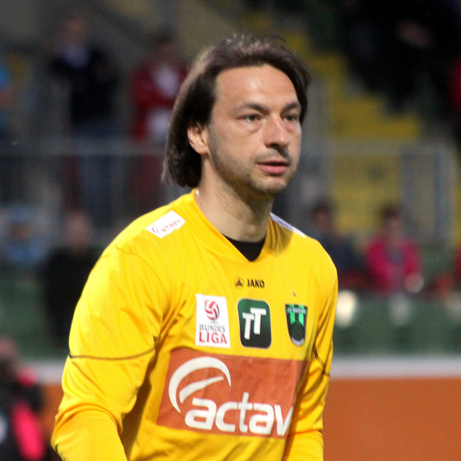 Meisterschaftsspiel der österreichischen Bundesliga: SV Mattersburg gegen FC Wacker Innsbruck am 7. April 2013 (0:0)] im Mattersburger Pappelstadion.] - Das Foto zeigt Szabolcs Sáfár (FC Wacker Innsbruck). Object location47° 44′ 21.66″ N, 16° 24′ 23.13″ E